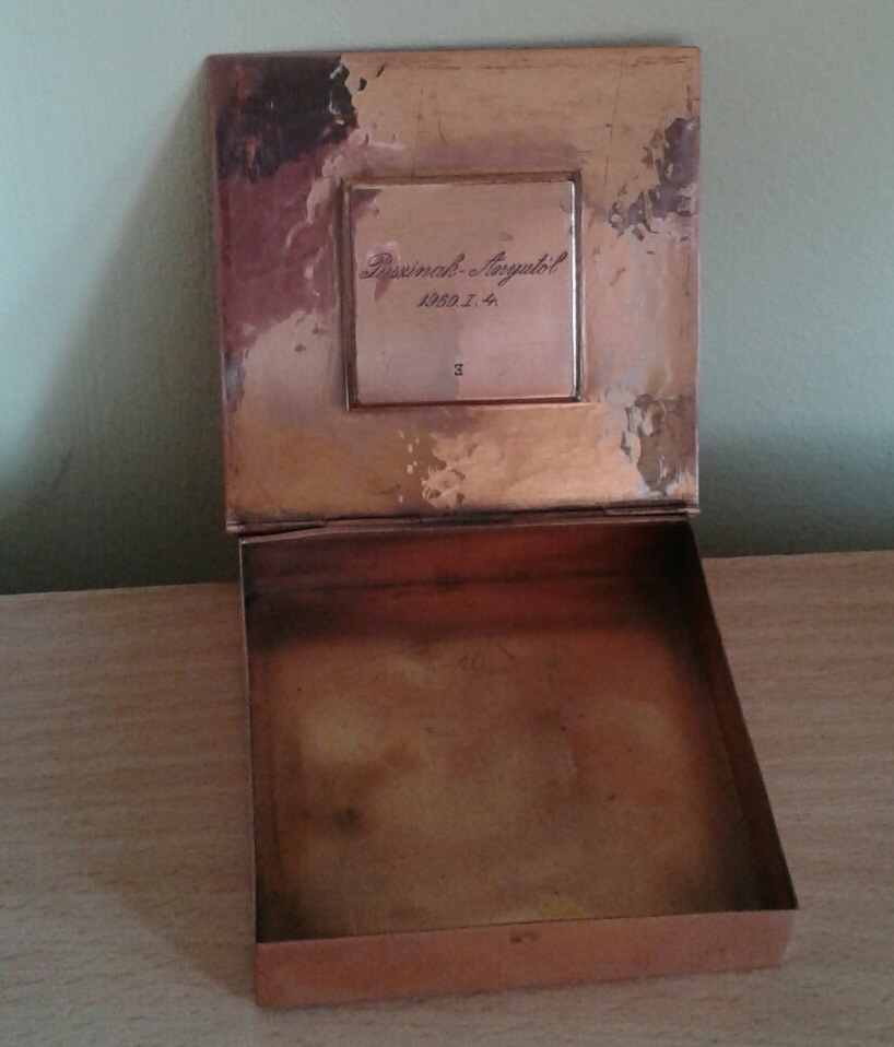 Boite offerte en cadeau portant une dédicace datée du 1er janvier 1960